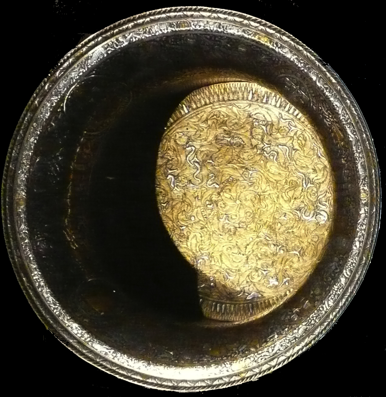 Category:Artworks with known accession number|LP26 ArtistMohammed ibn al-ZaynTitleBaptistère de saint LouisDatebetween circa 1320 and circa 1340Mediumhammered brass; engraved decoration, gold, silver and nielloDimensionsHeight: 22.2 cm (8.7 in). Diameter: 50.2 cm (19.8 in).Current location (Inventory)Louvre Museum Native nameMusée du LouvreLocationParisCoordinates48° 51′ 37″ N, 2° 20′ 15″ E Established1793Website control VIAF: 130051079 ISNI: 0000 0001 2260 177X ULAN: 500125189 LCCN: n80020283 NLA: 35912436 WorldCat This work is part of the collections of the Louvre (Department of Islamic Art).Accession numberLP 26 Object historyProvenance: Syria or EgyptReferencesMusée du Louvre, Atlas database: entry 21176Source/PhotographerMohammed ibn al-Zayn